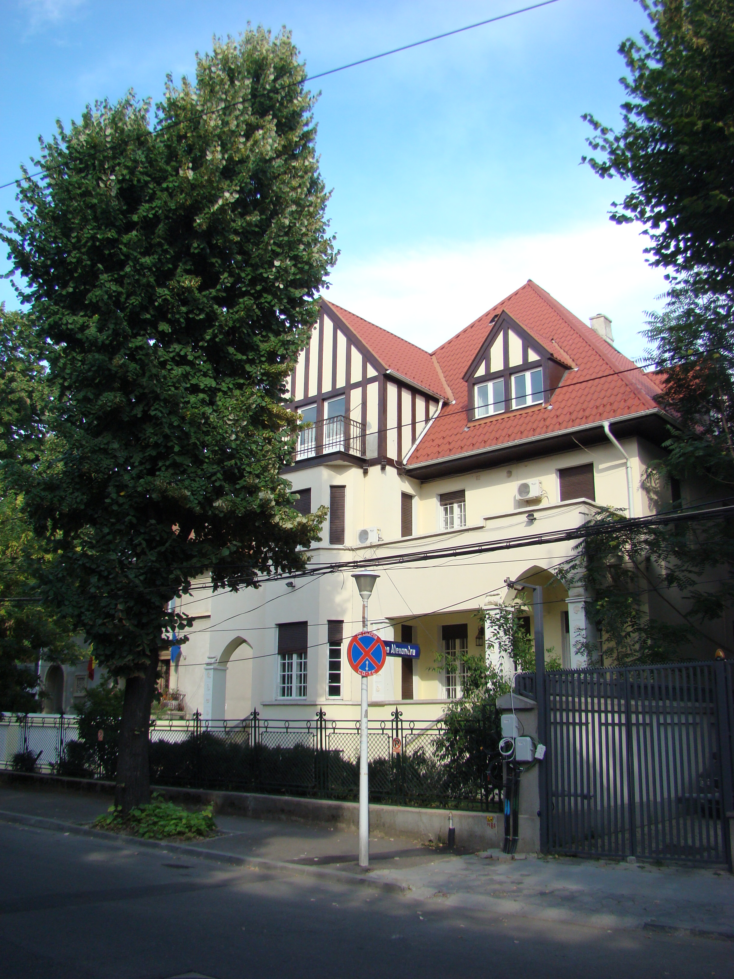 Casă monument istoric, str. Aleea Alexandru, nr.22